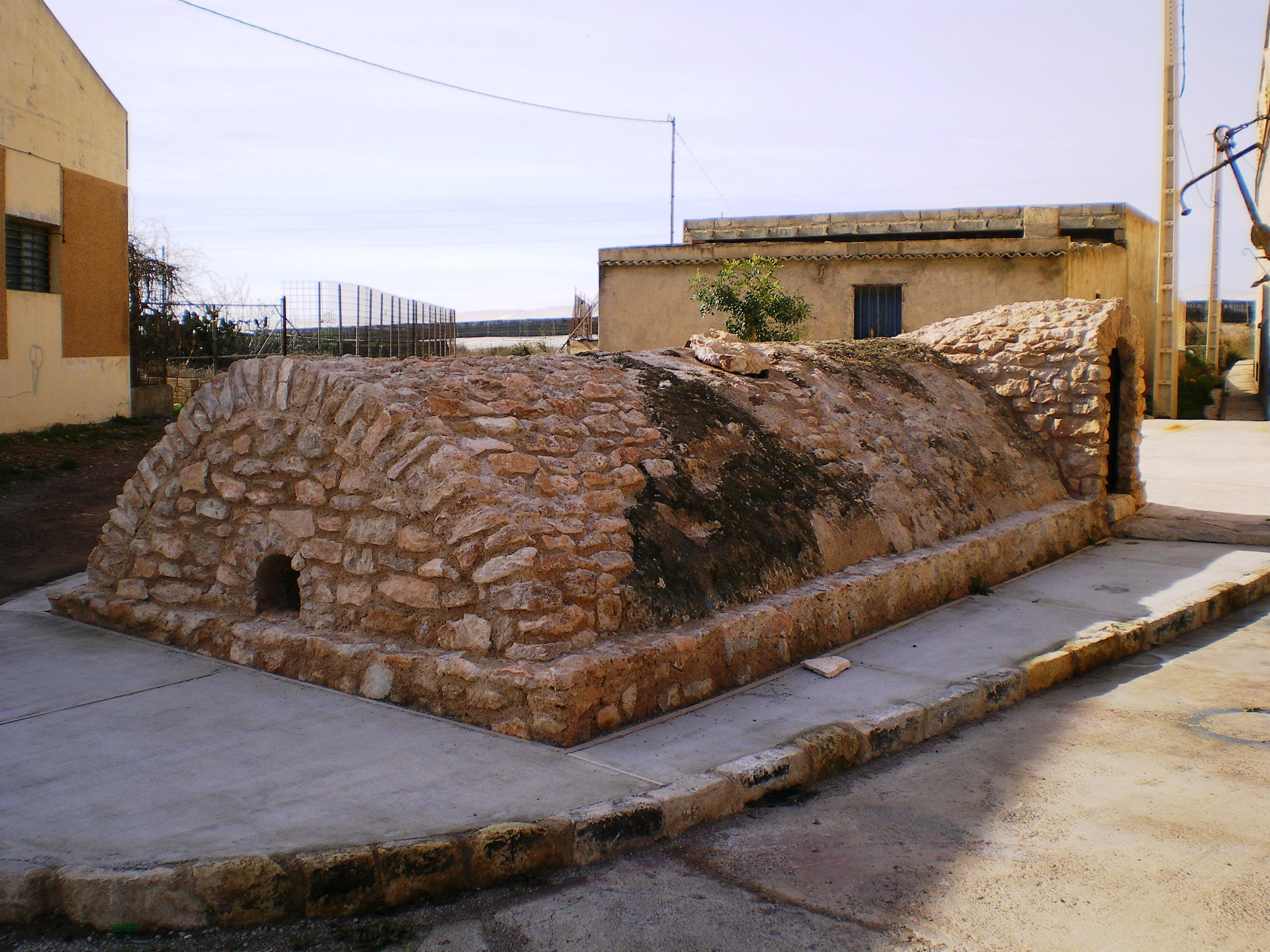 Fotografía del Aljibe Daimuz, ss.XII-XIII, en El Ejido, Almería, España.